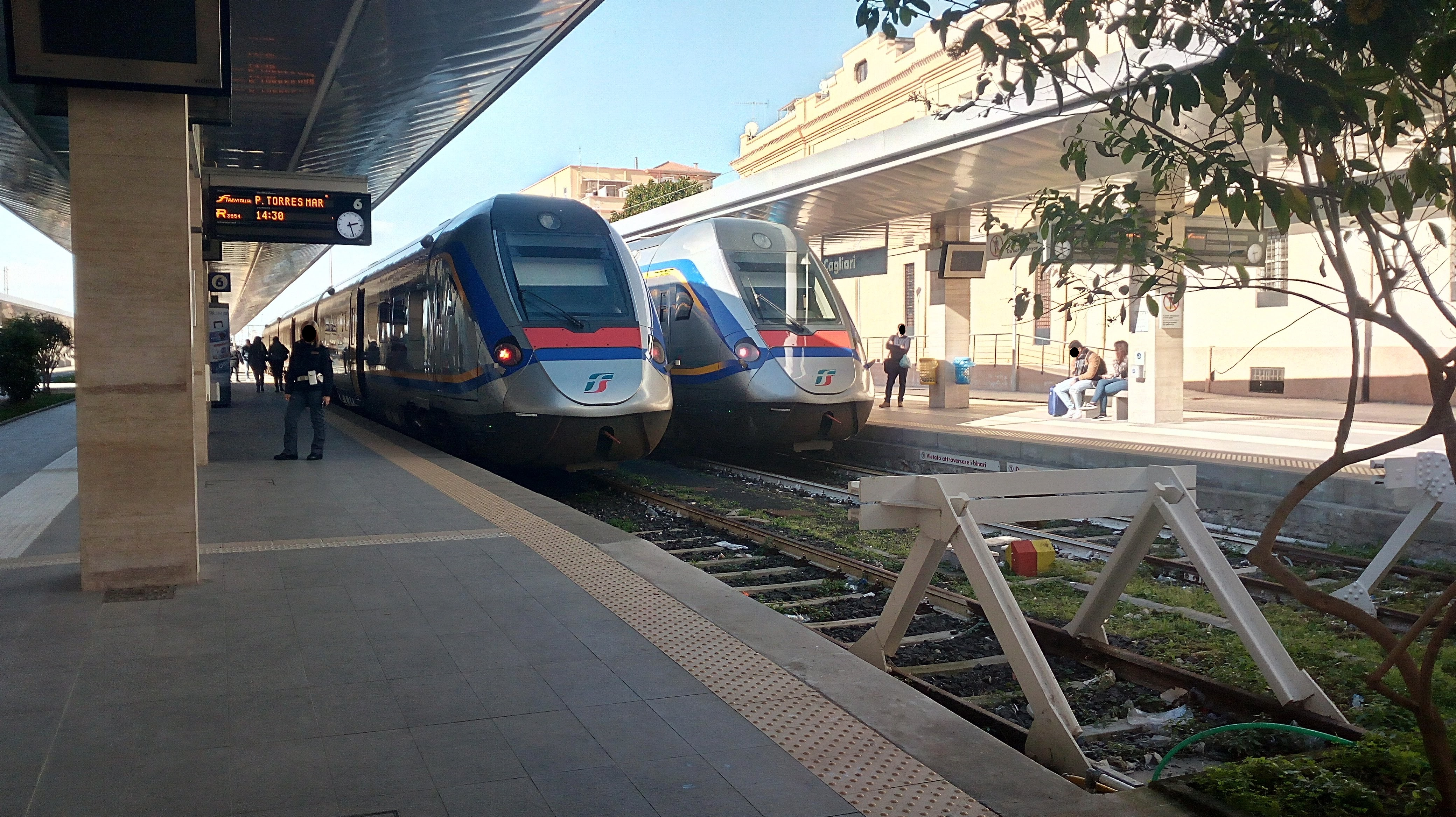 Due ATR365 fermi a Cagliari, con livrea DTR di Trenitalia.